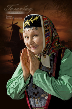 Роль Бадига